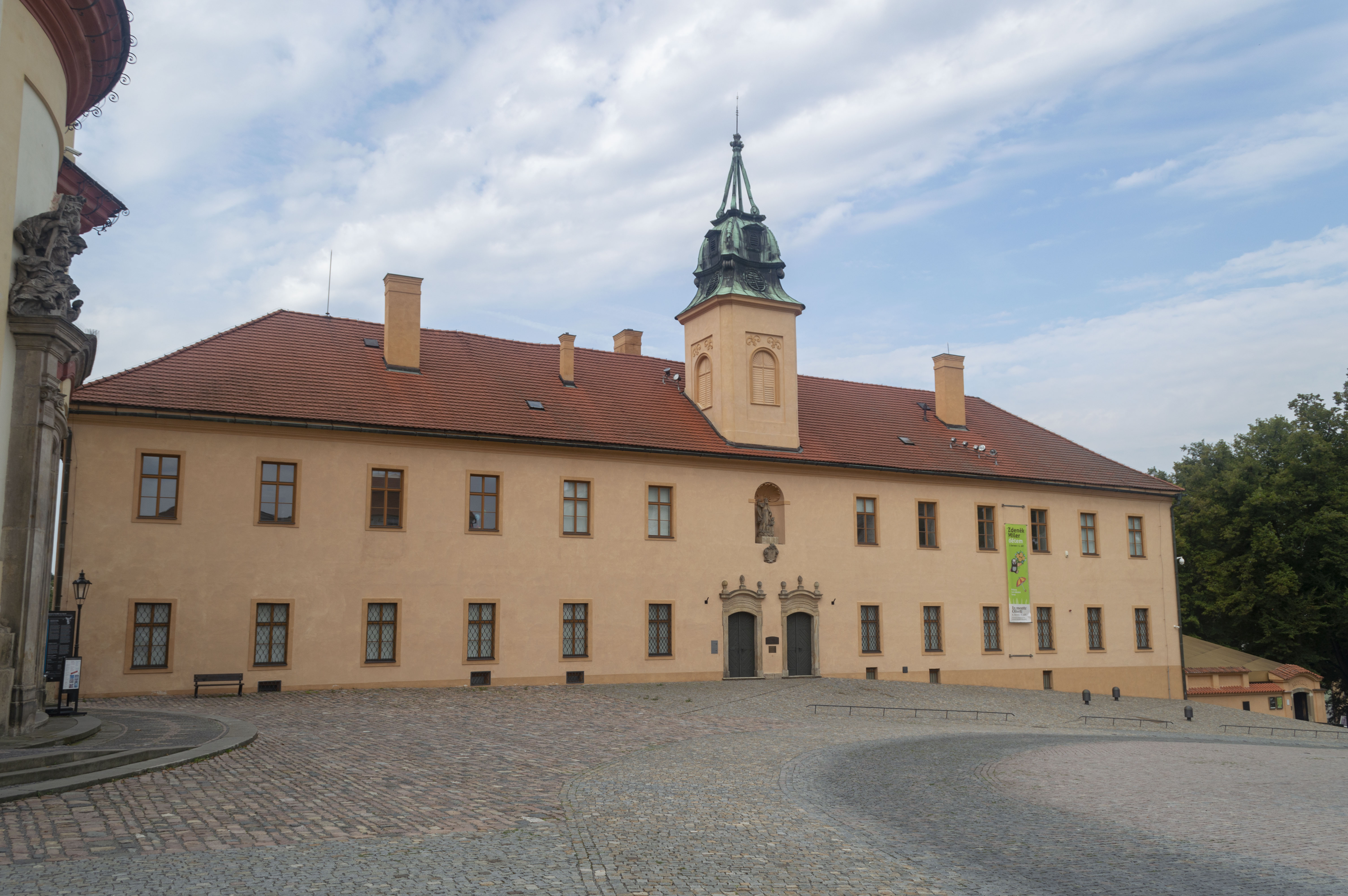 Piaristické gymnázium, Regionální muzeum (Litomyšl)